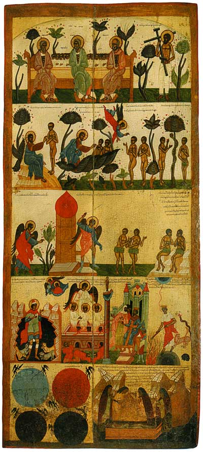 Дверь в жертвенник Школа или худ. центр: Подмосковье Центральный музей древнерусской культуры и искусства им. Андрея Рублева, Москва, Россия Инв. КП 352